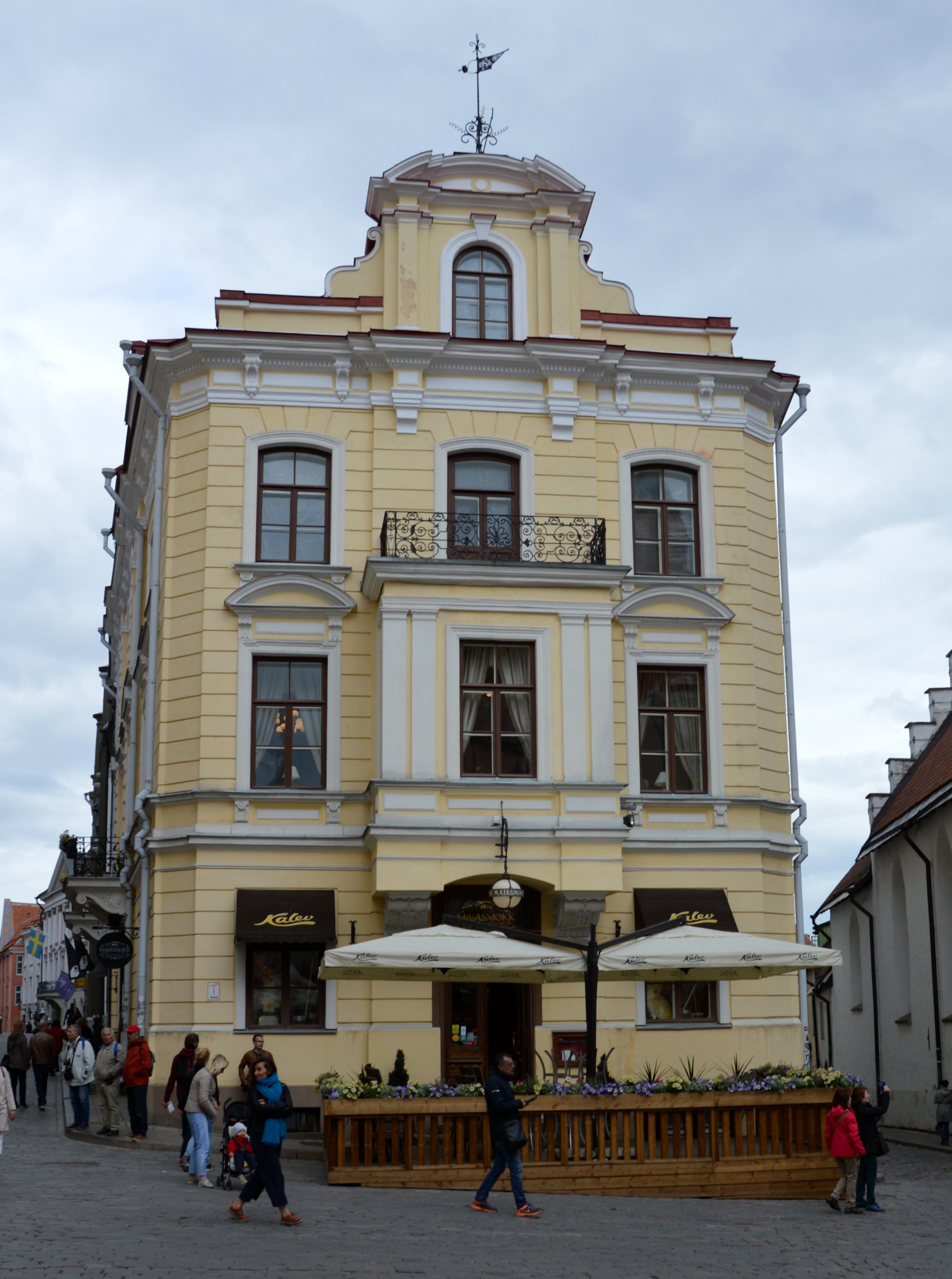 Cafe Maiasmokk Feinschmecker 2018